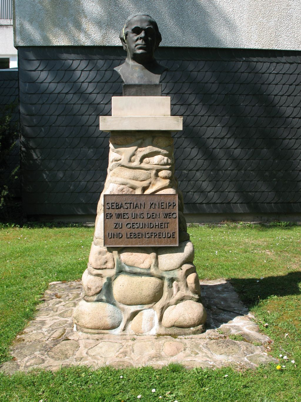 Kneipp-Denkmal im Kurpark von Bad Lauterberg